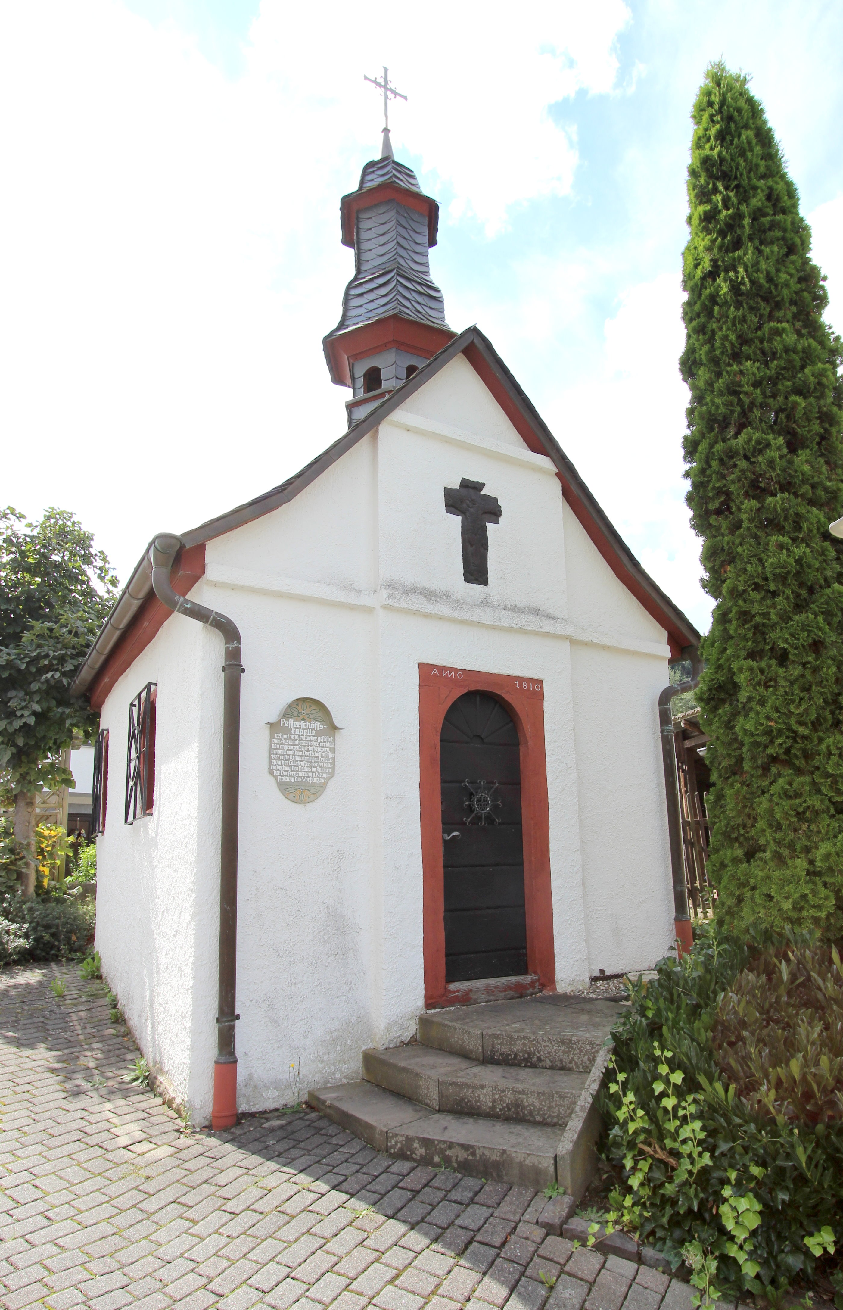 53518 Wimbach, Hauptstraße, hinter Nr. 25. Saalbau, bezeichnet 1810. Aufnahme von 2017.